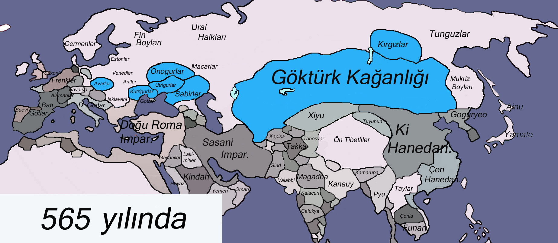 Kaynak: Haritanın büyük bir kısmı Thomas Lessmann'nin izini ile kendi ürettiği Tarihi dünya haritaları'ndan alınmıştır. Ayrıca Jean-Paul Roux'un Türklerin Tarihi (ISBN 975-997-091-0) adlı kitabındaki tariflerine göre ve Büyük Tarih Atlası (Arkın Kitabevi ISBN 975-402-012-4) ile bazı düzeltmeler ve ilaveler yapılmıştır.